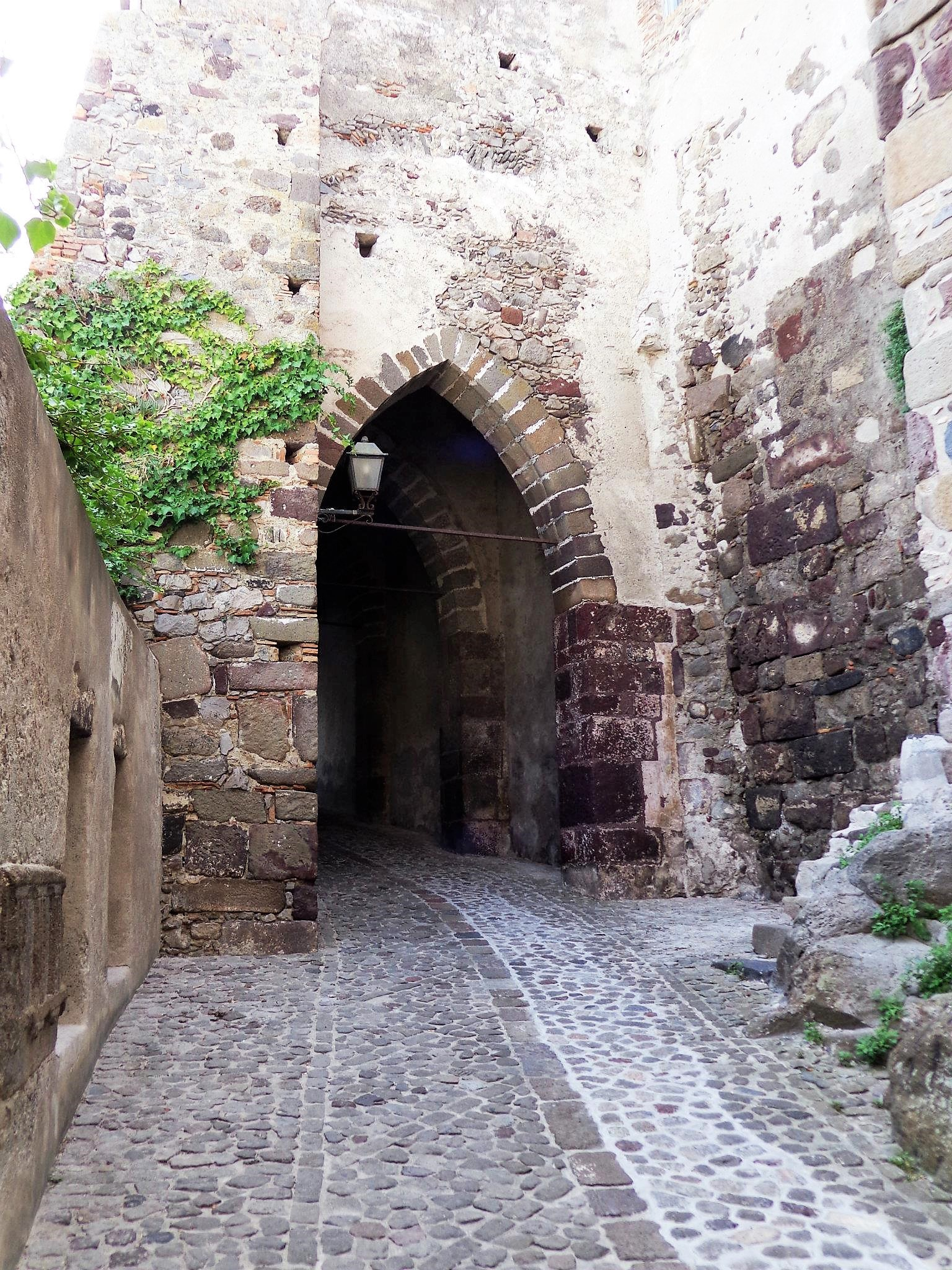 Accesso